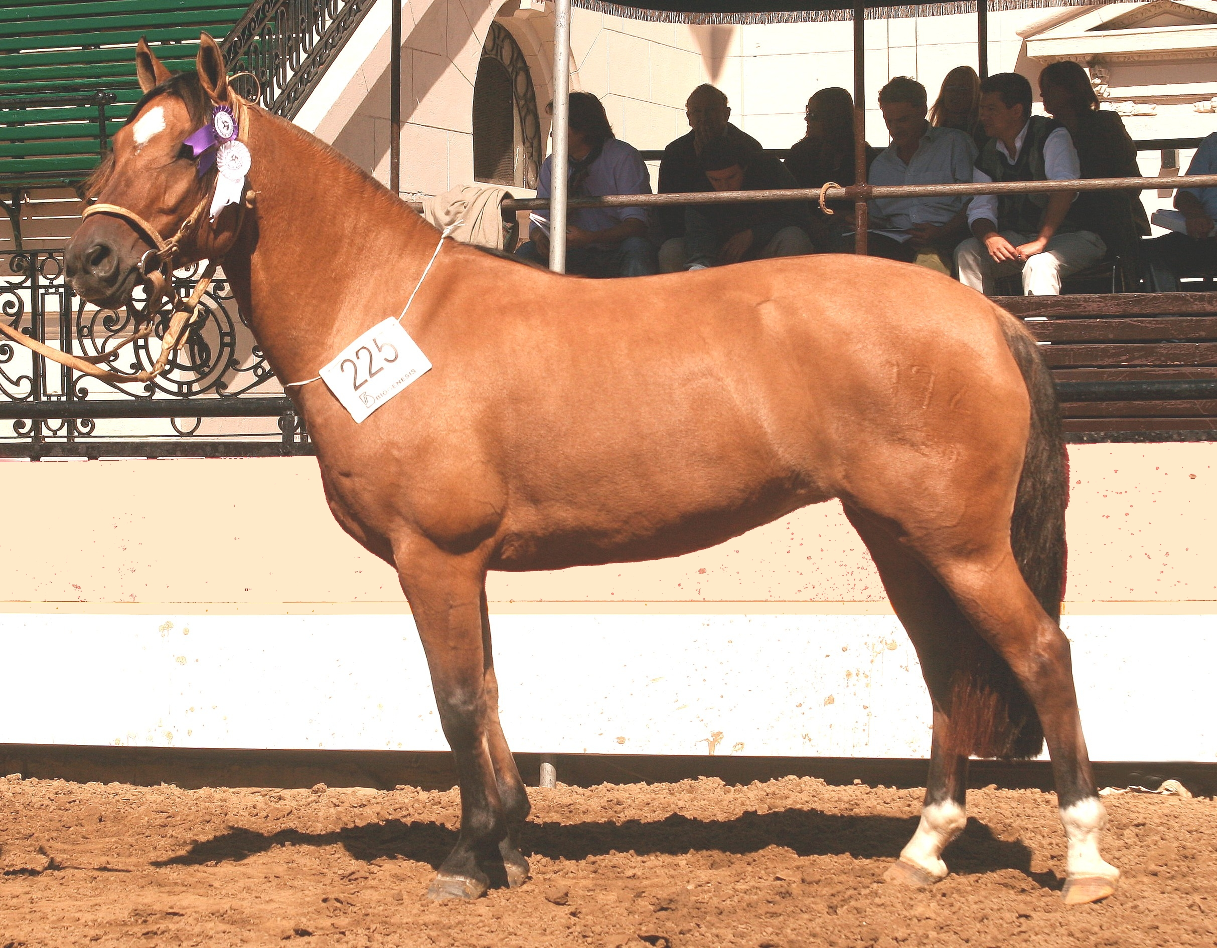 Yegua de raza criolla argentina